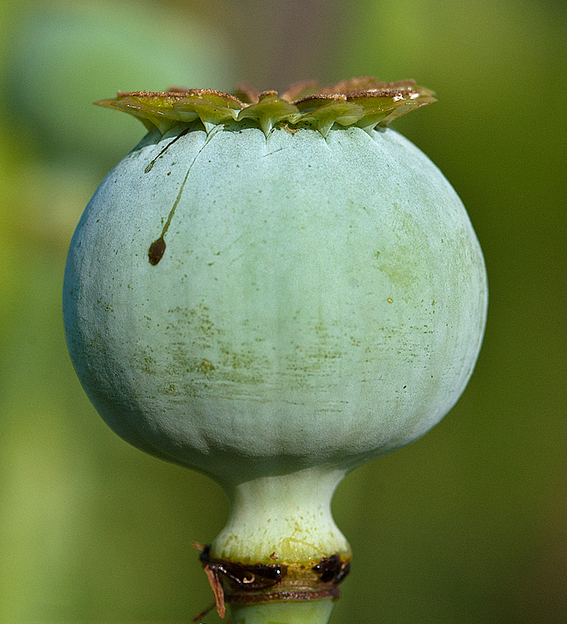 Mohnkapsel